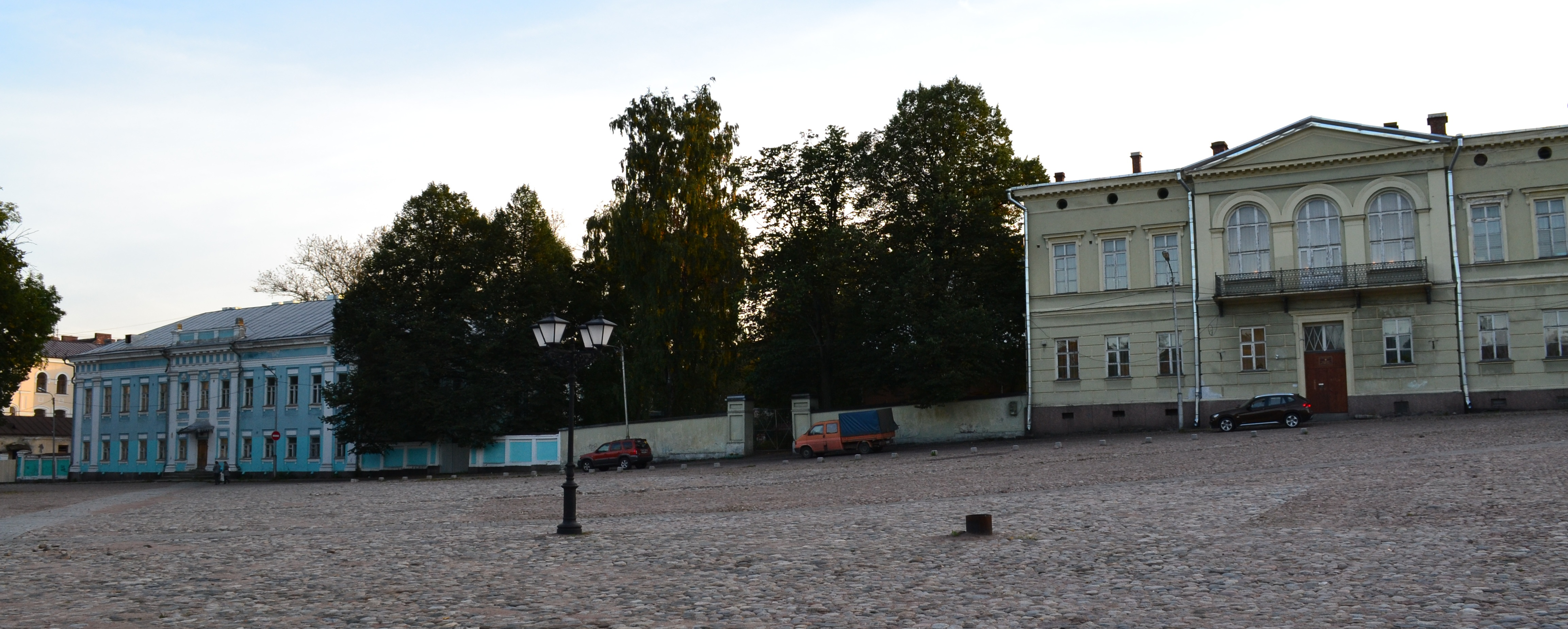 Дом президента губернского суда (Санкт-Петербург и Лен.область, Выборг, сторожевой башни улица, 25)